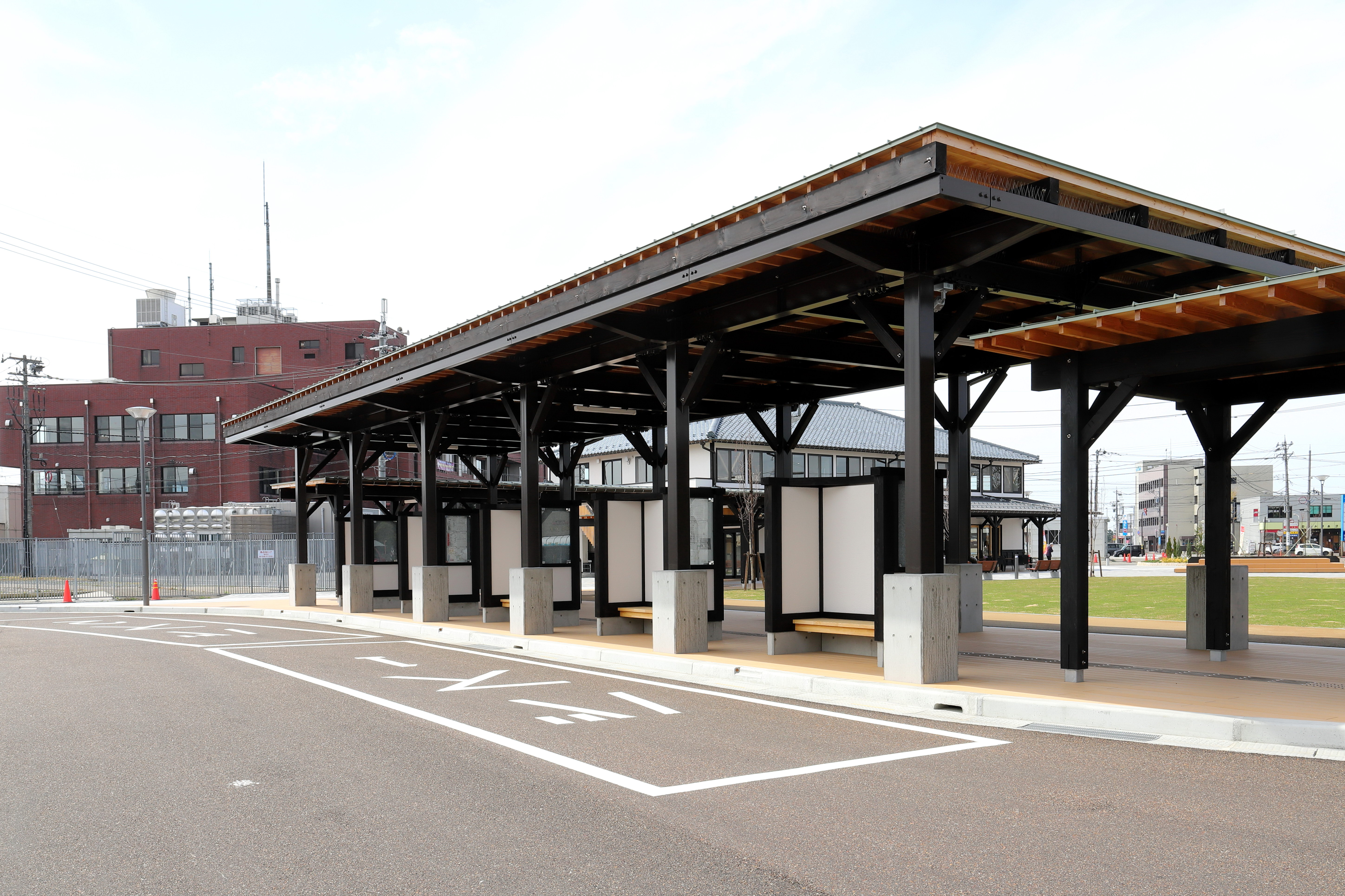 丸岡バスターミナル バスのりば Canon EOS 6D Mark II